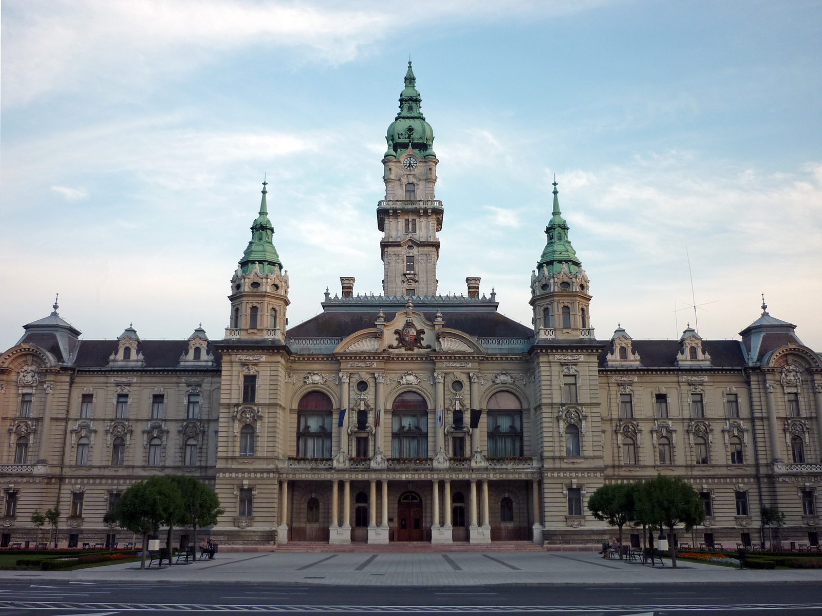 Tanácsház (Győr, Városház tér 1 .)